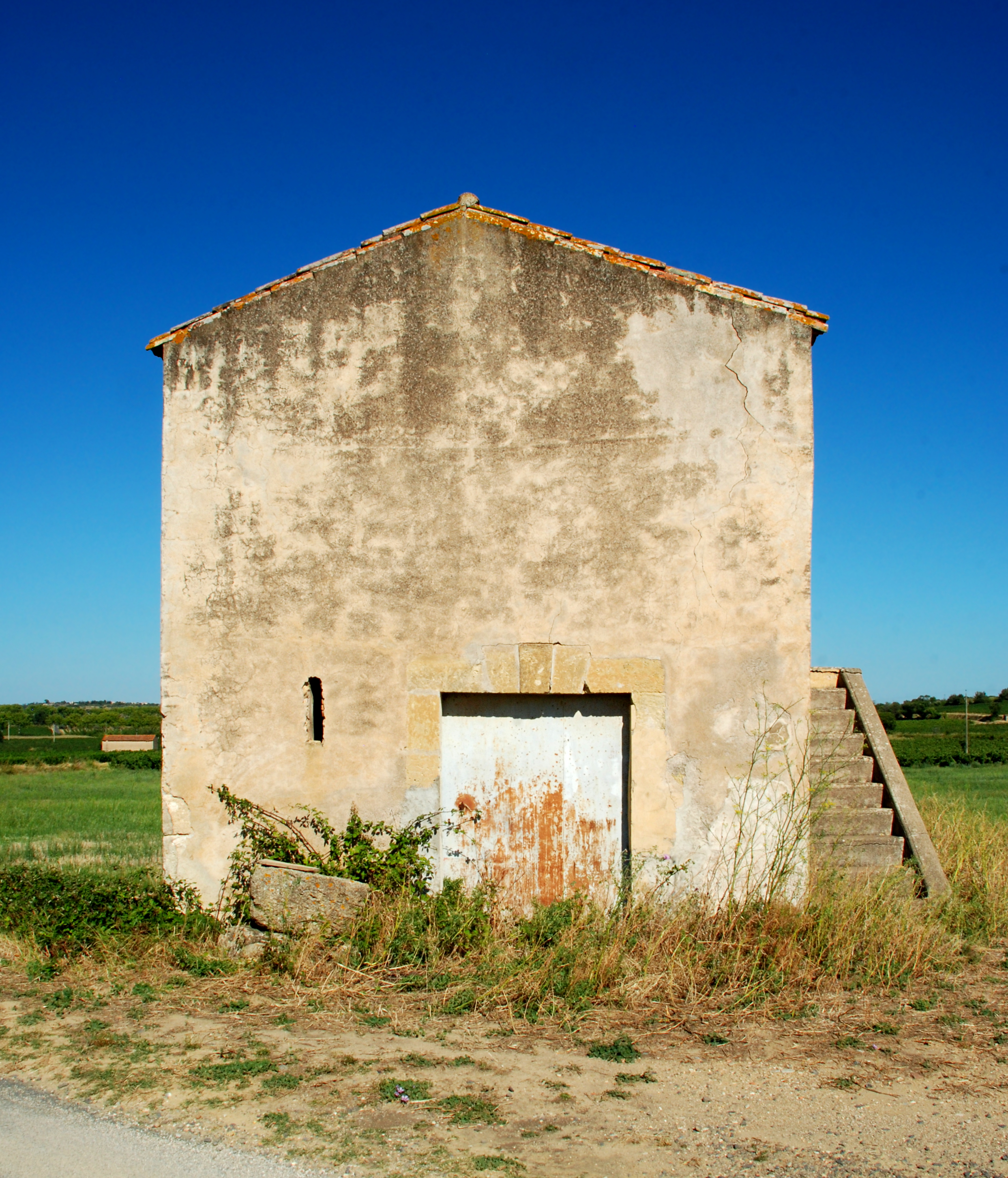 France - Languedoc - Hérault - Roujan - chapelle Saint-Nazaire